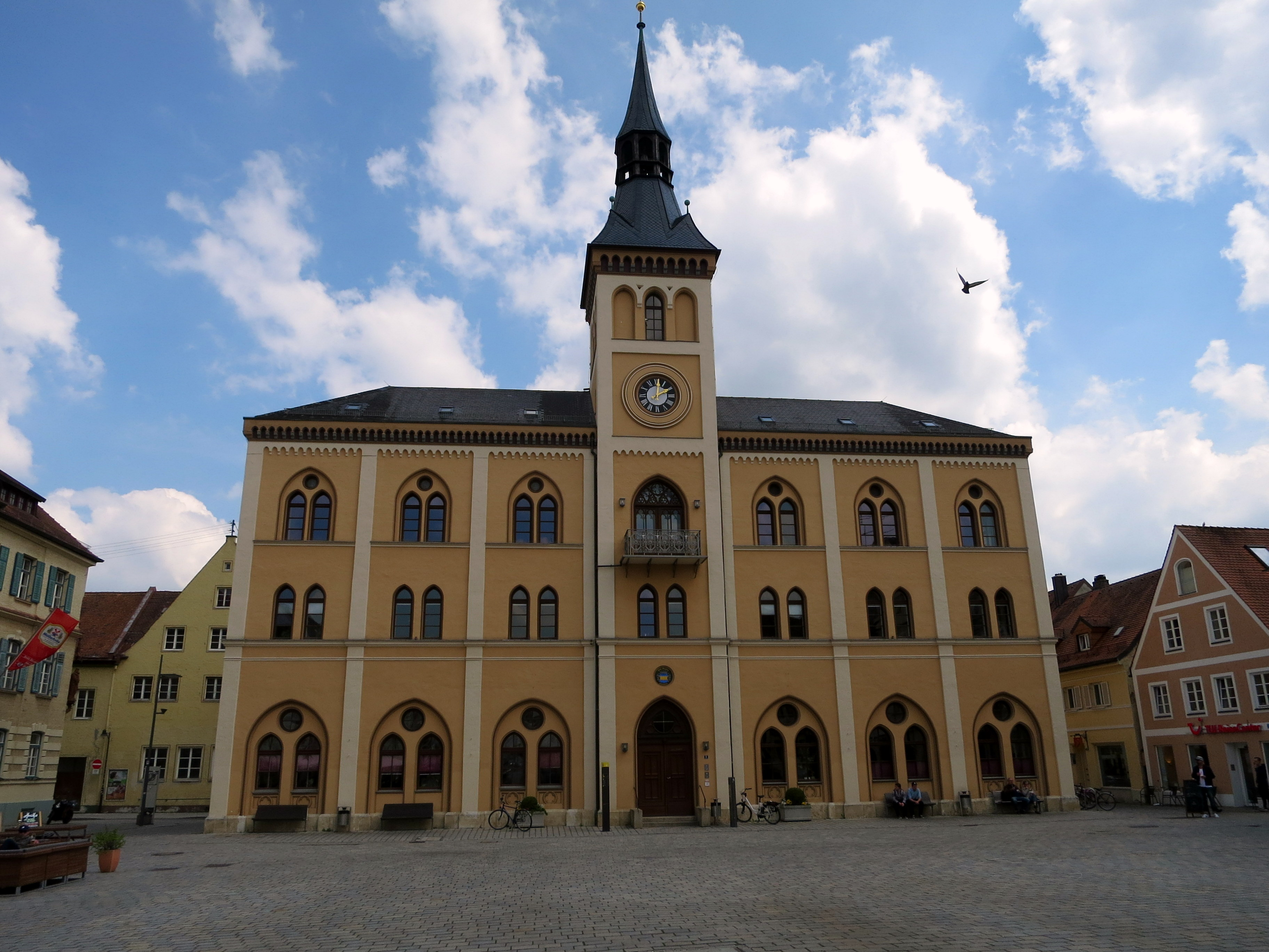 Schließt den Hauptplatz wirkungsvoll ab